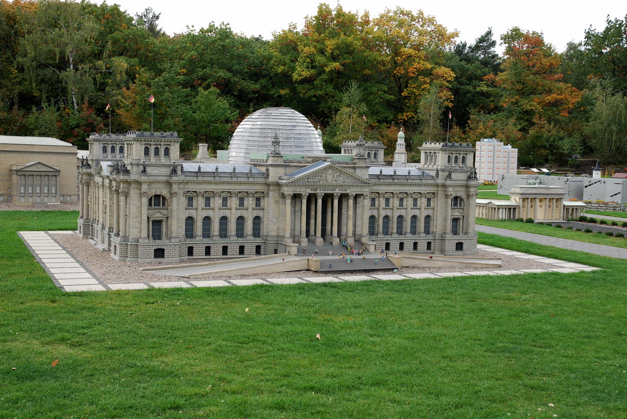 Der Berliner Reichstag im Modellpark Wuhlheide.